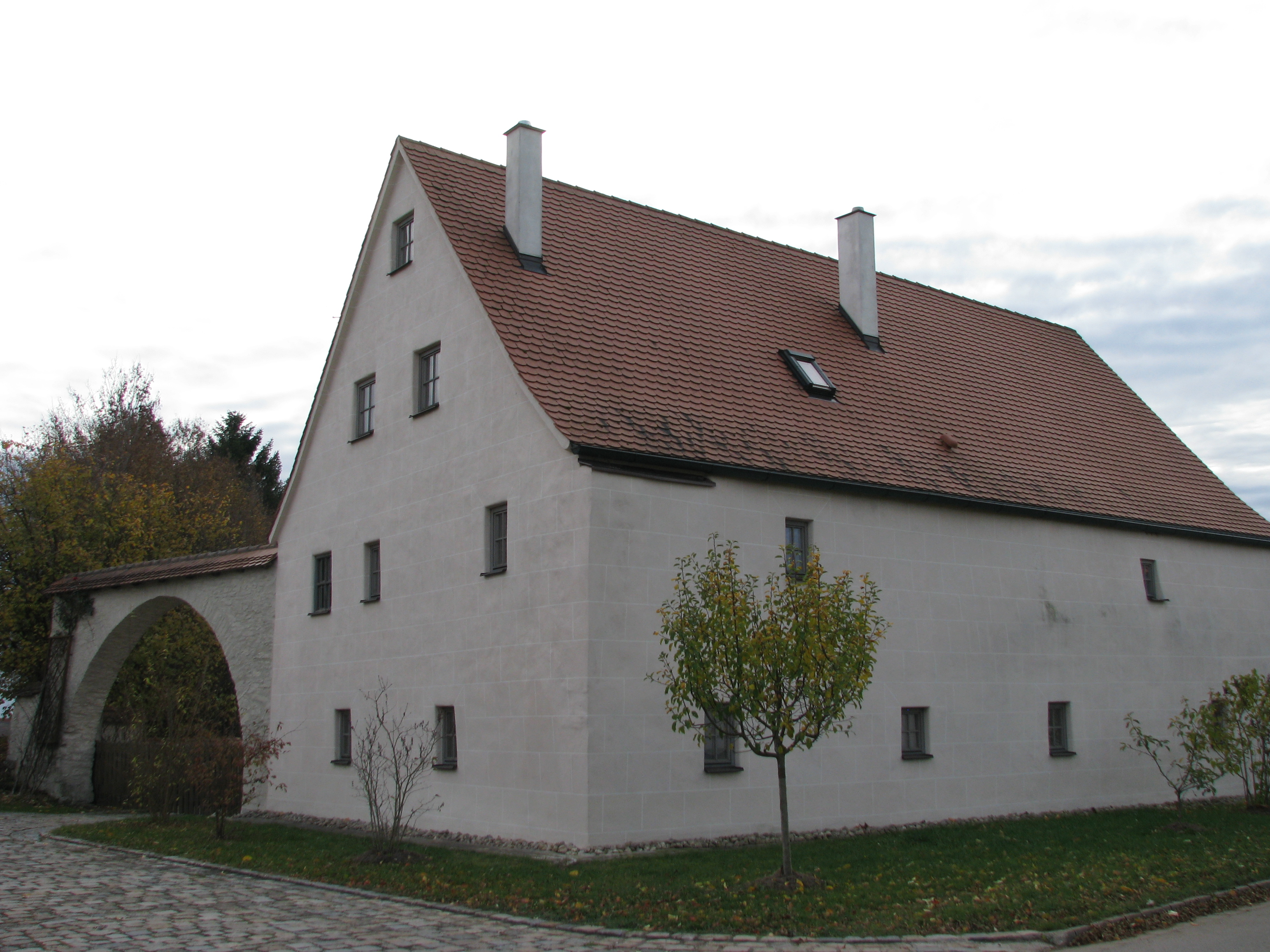 Viehhausen, Ortsteil von Greding im Landkreis Roth in Bayern, Hofanlage Viehhausen Nr. 1 (Baudenkmal)